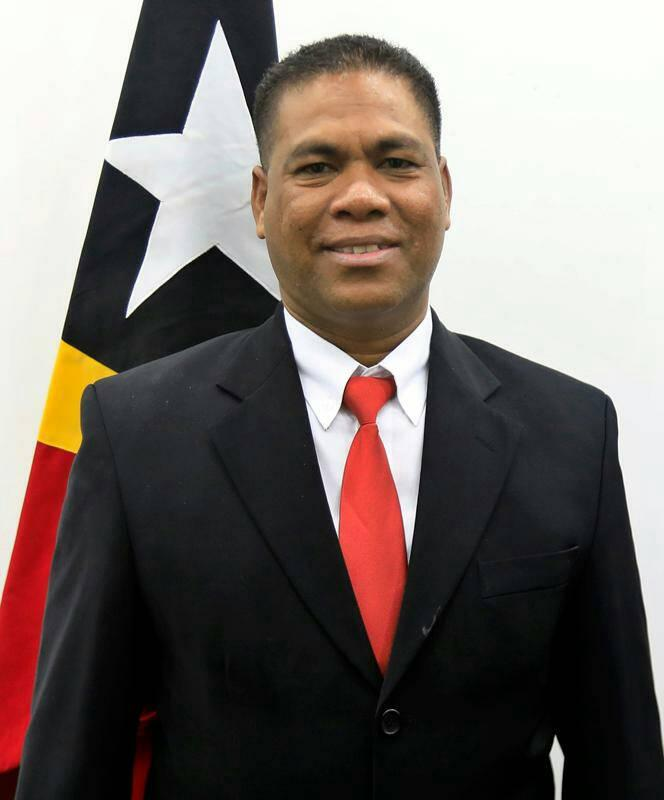 Longuinhos dos Santos